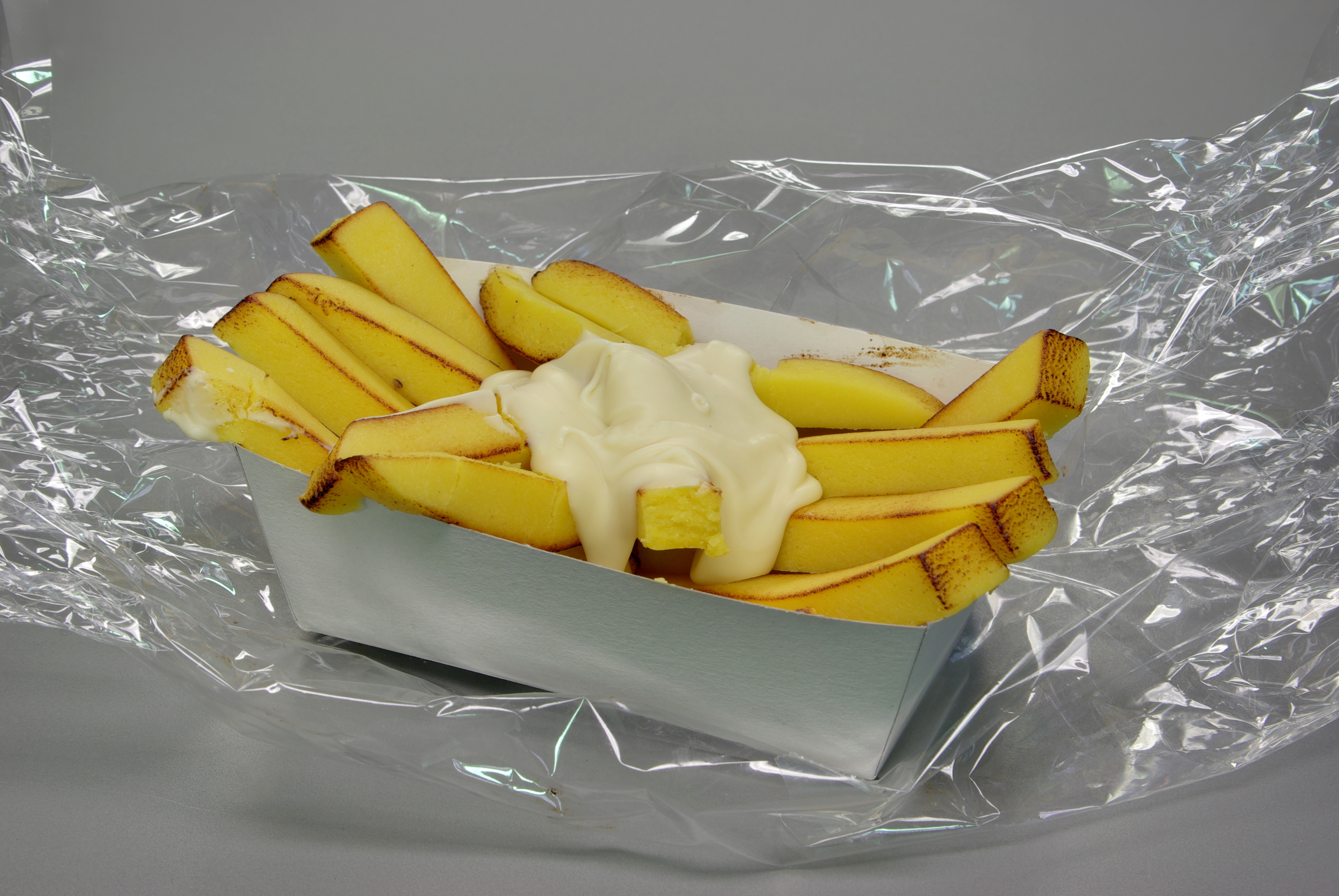 Pommes frites Pralines from Belgium